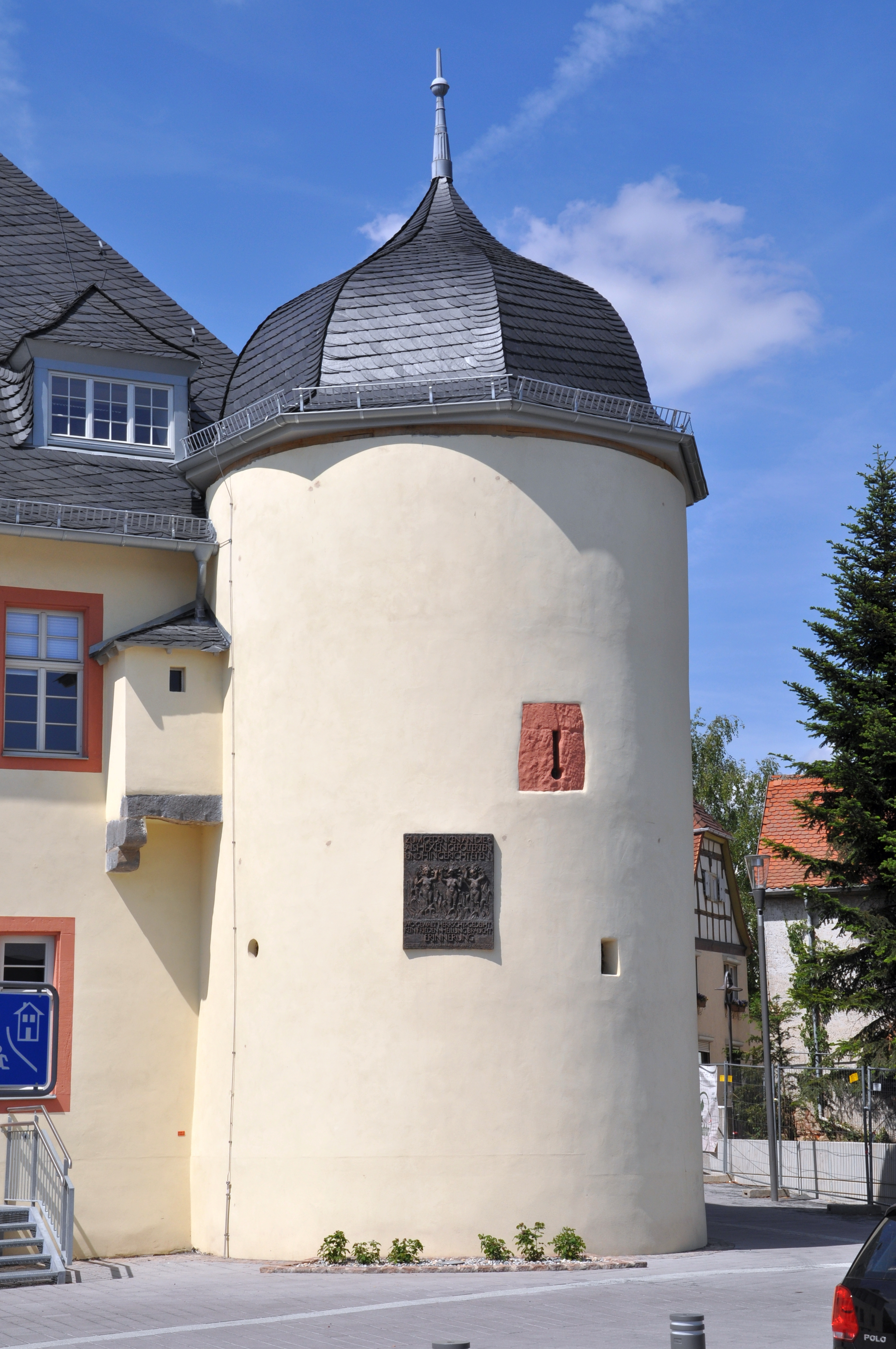 Der sogenannte Hexenturm in Hofheim am Taunus